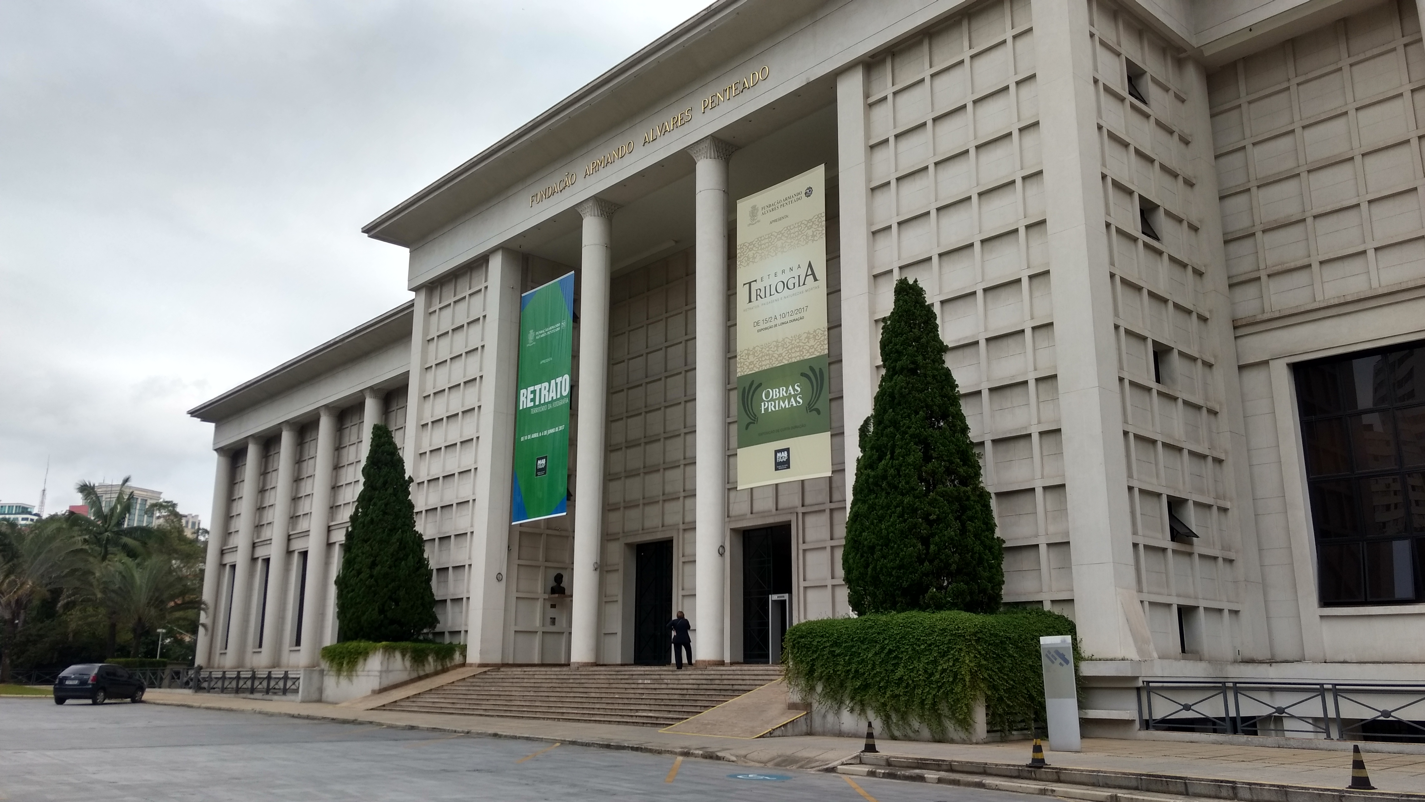 Exterior do Museu de Arte Brasileira da Fundação Armando Álvares Penteado